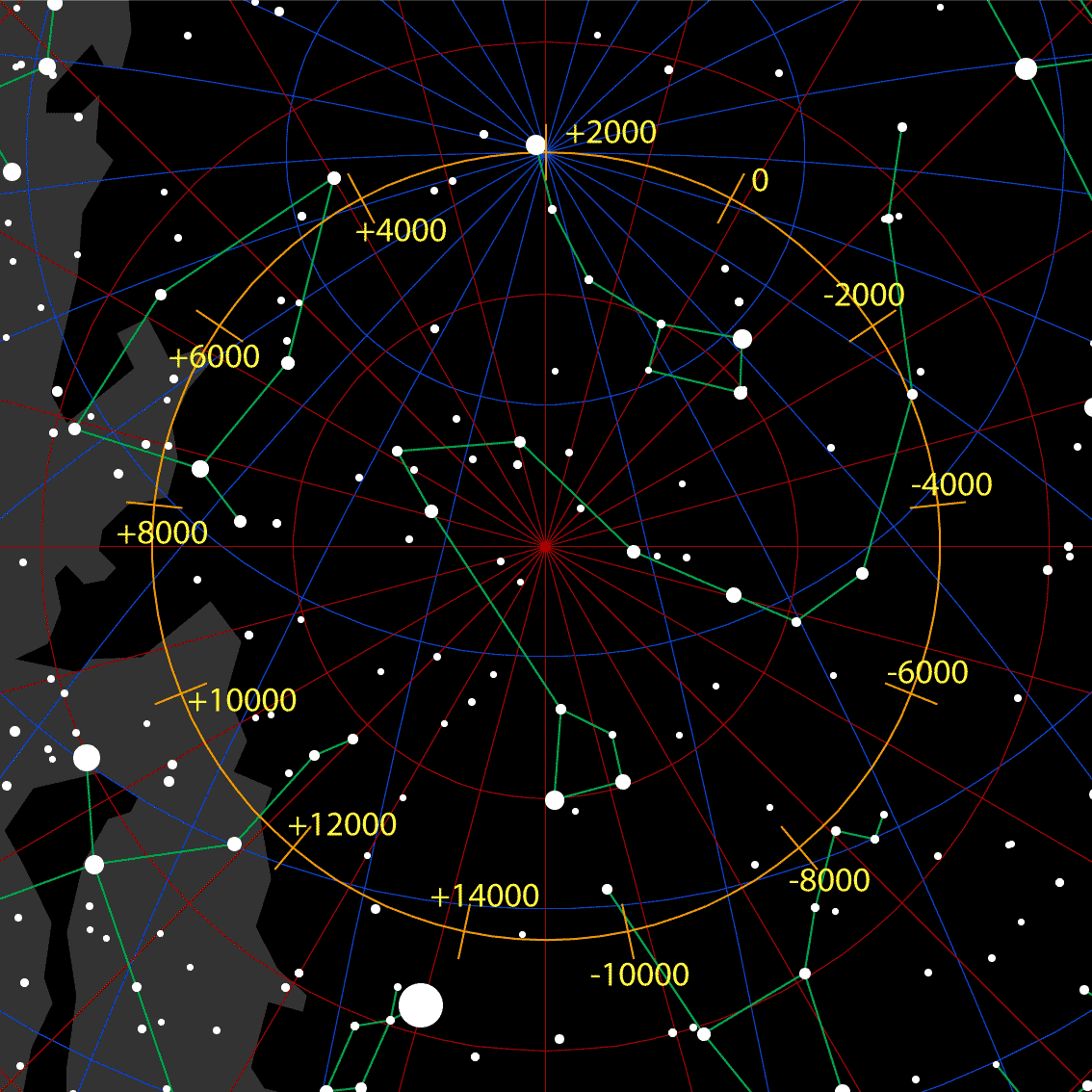 Precessione, versione in png di un file di commons in gif che crea errori di visualizzazione su FF 3.0 e IE7. NON SEGNALARE COME DOPPIO PER FAVORE!!